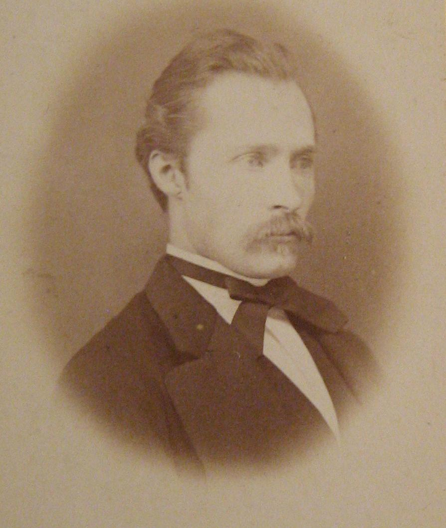 Porträtt av Wilhelm Uppström (1844-1935)